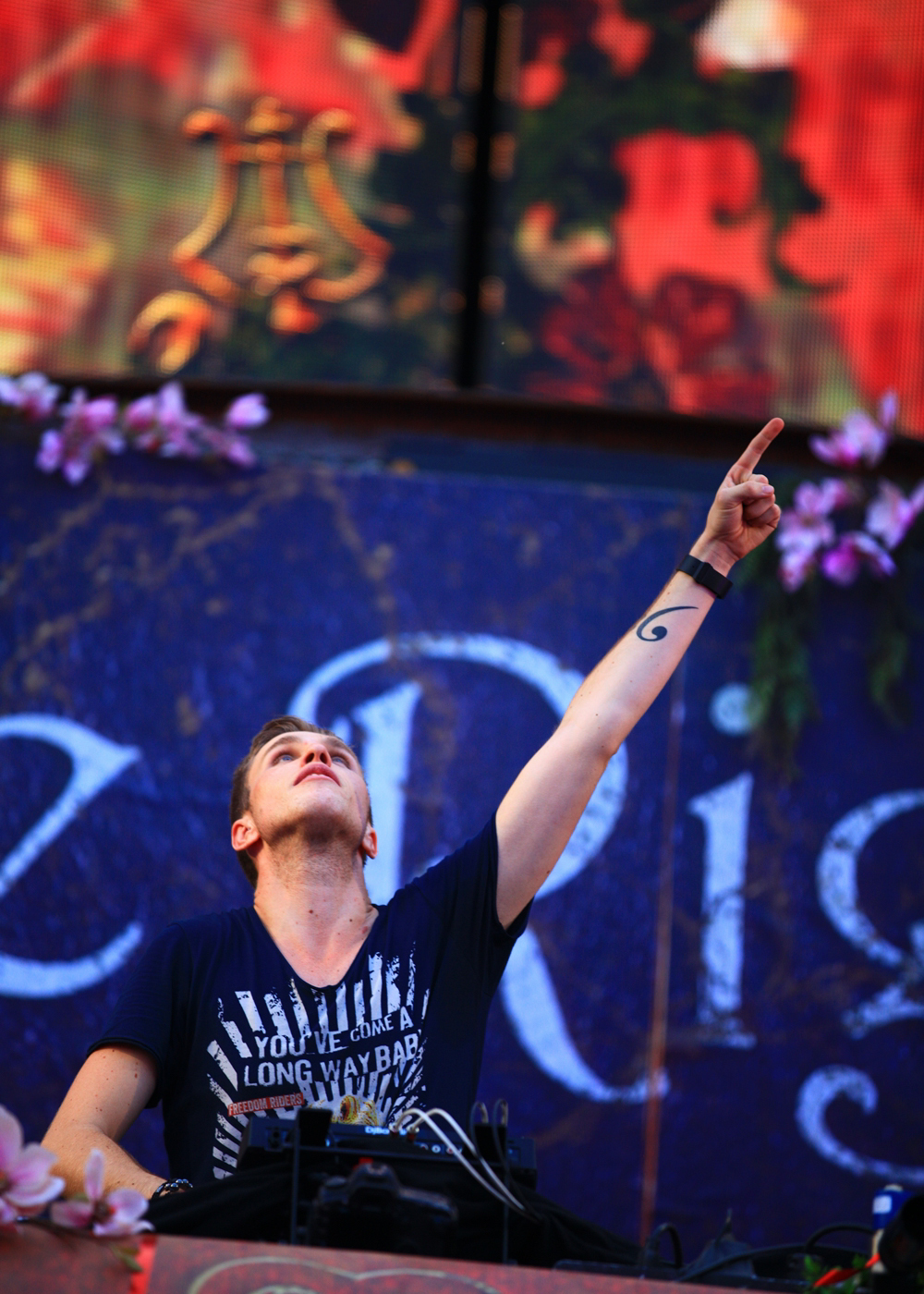 Nicky Romero Live DJ hands up Photo by twitter(tweet) tumblr(reblog) pinterest(pin) instagram radit... SNS SHARE OK! 原作者のクレジット（氏名、作品タイトルなど）を表示し、改変した場合には元の作品と同じCCライセンス（このライセンス）で公開することを主な条件に、営利目的での二次利用も許可されるCCライセンス。 著作権は放棄しませんが営利使用は許可されました。 アーティスト、被写体を不都合となる行為はおやめください。